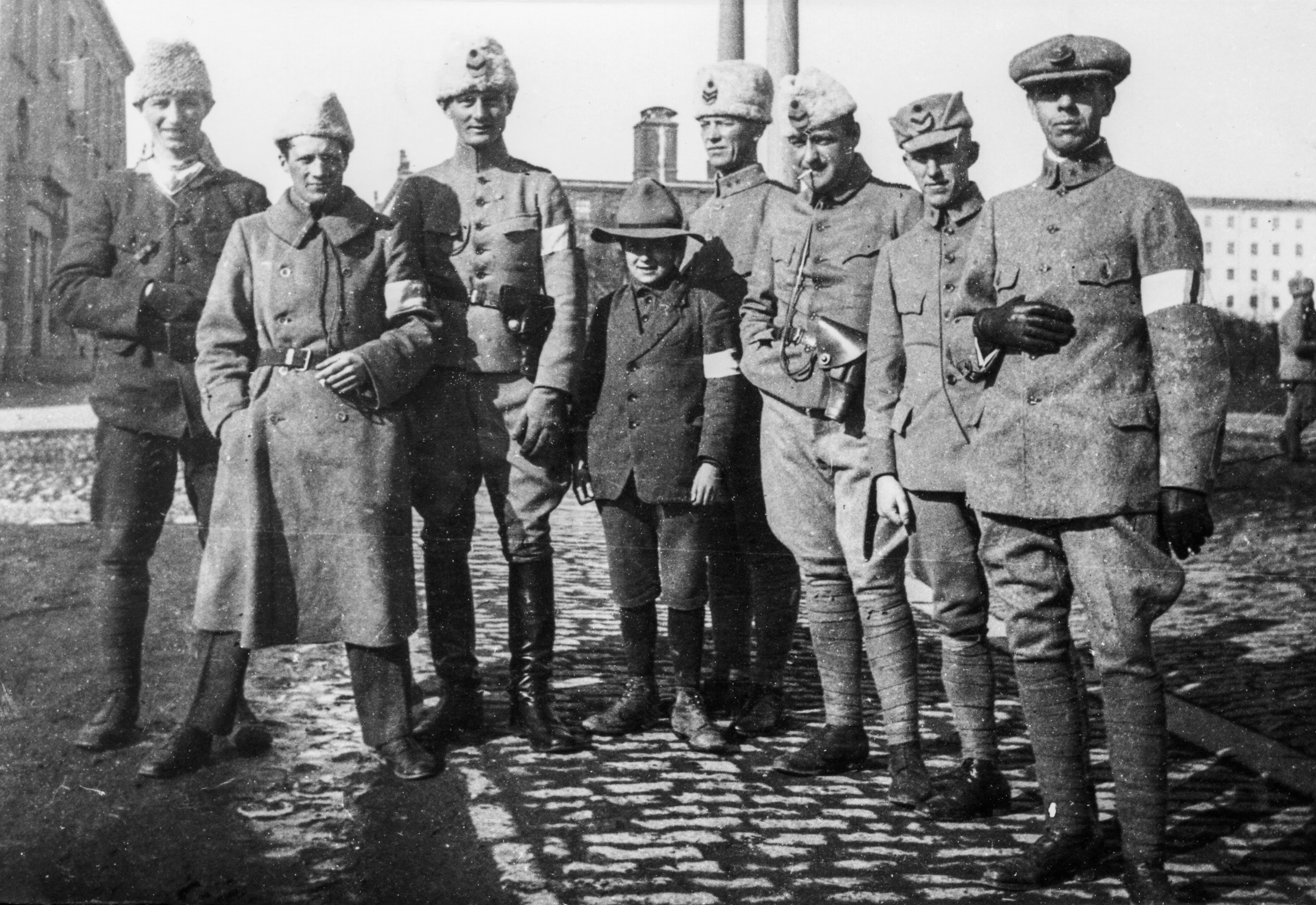 Kuvattu Satakunnankadulla Tampereen valtauksen jälkeen. CC-BY Tampere 1918, kuvaaja tuntematon, Vapriikin kuva-arkisto. Finnish Civil War 1918, Photographer unknown, Vapriikki Photo Archives.